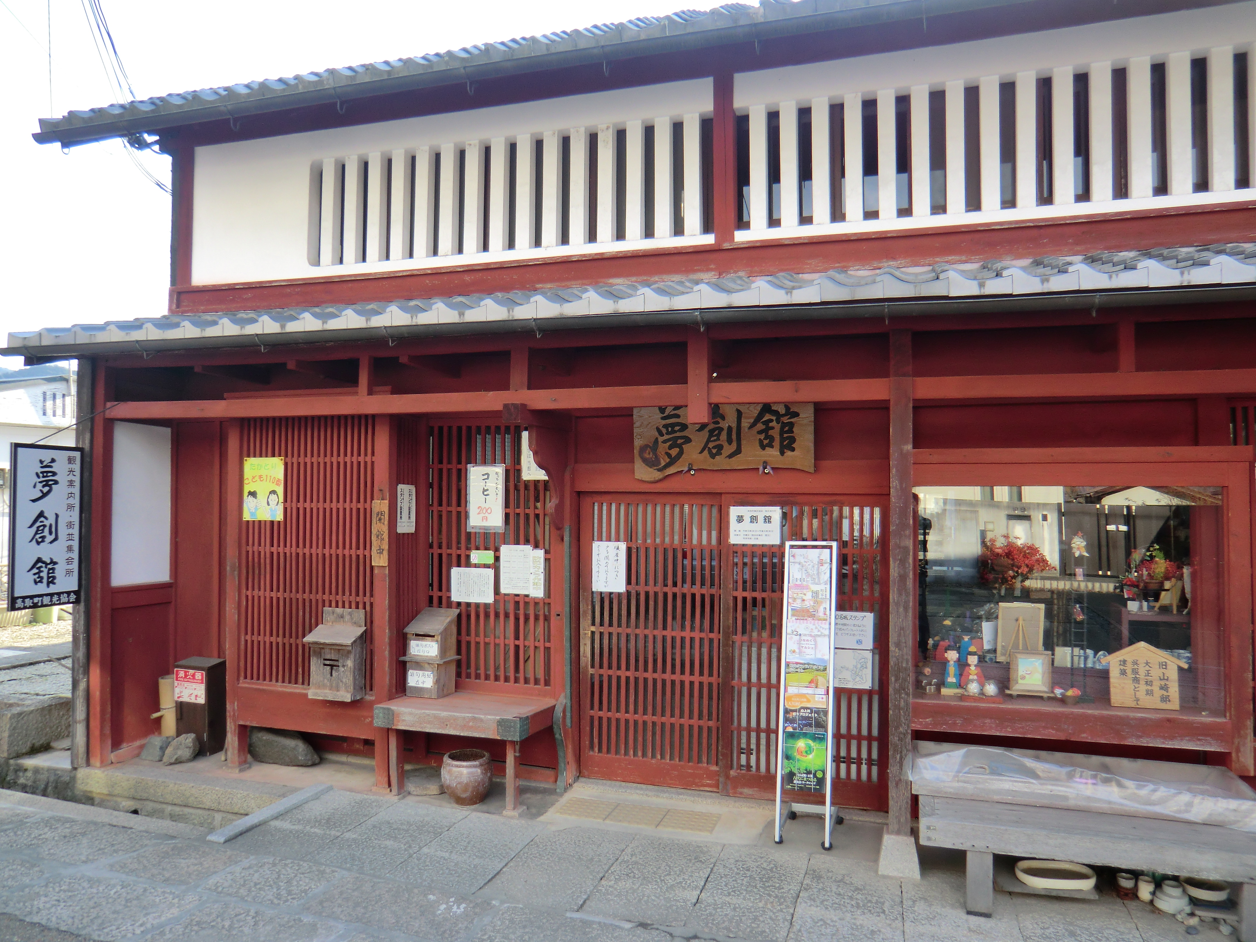 夢創舘 (奈良県高取町)